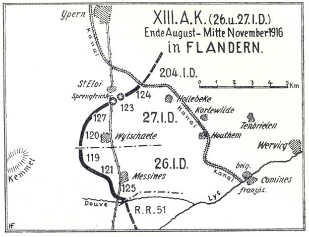 Karte: Das XII. (württ.) Armee-Korps 1916 in Flandern